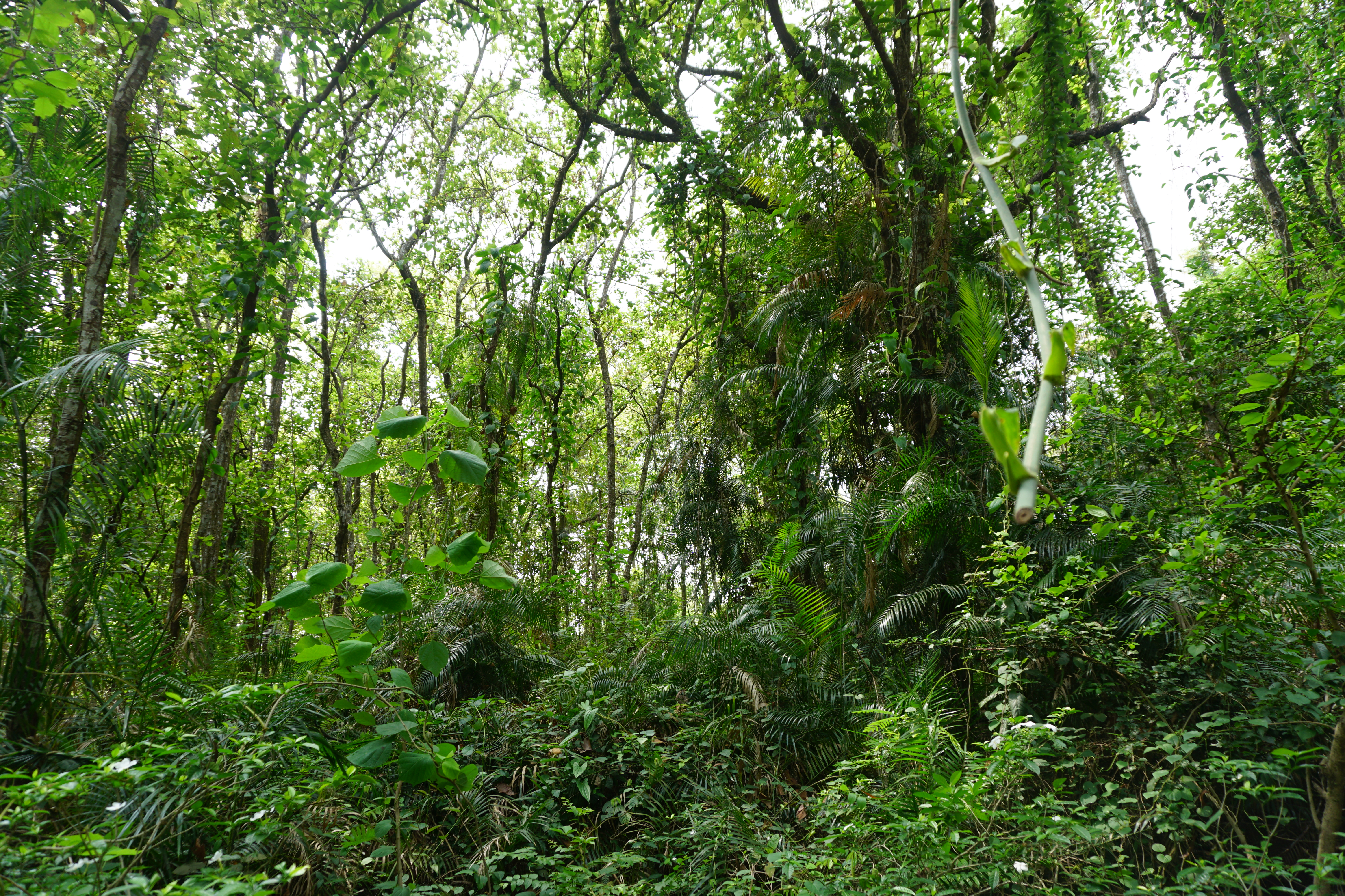 আলতাদীঘি জাতীয় উদ্যান